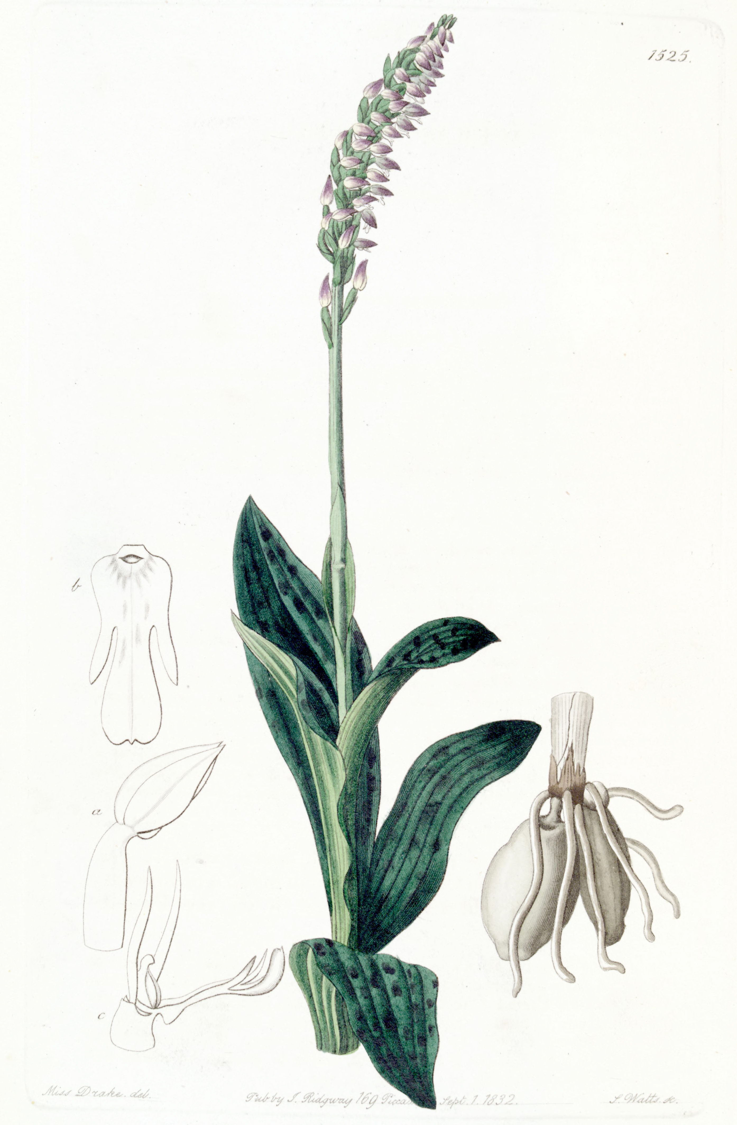 Neotinea maculata (as syn. Aceras secundiflorum)